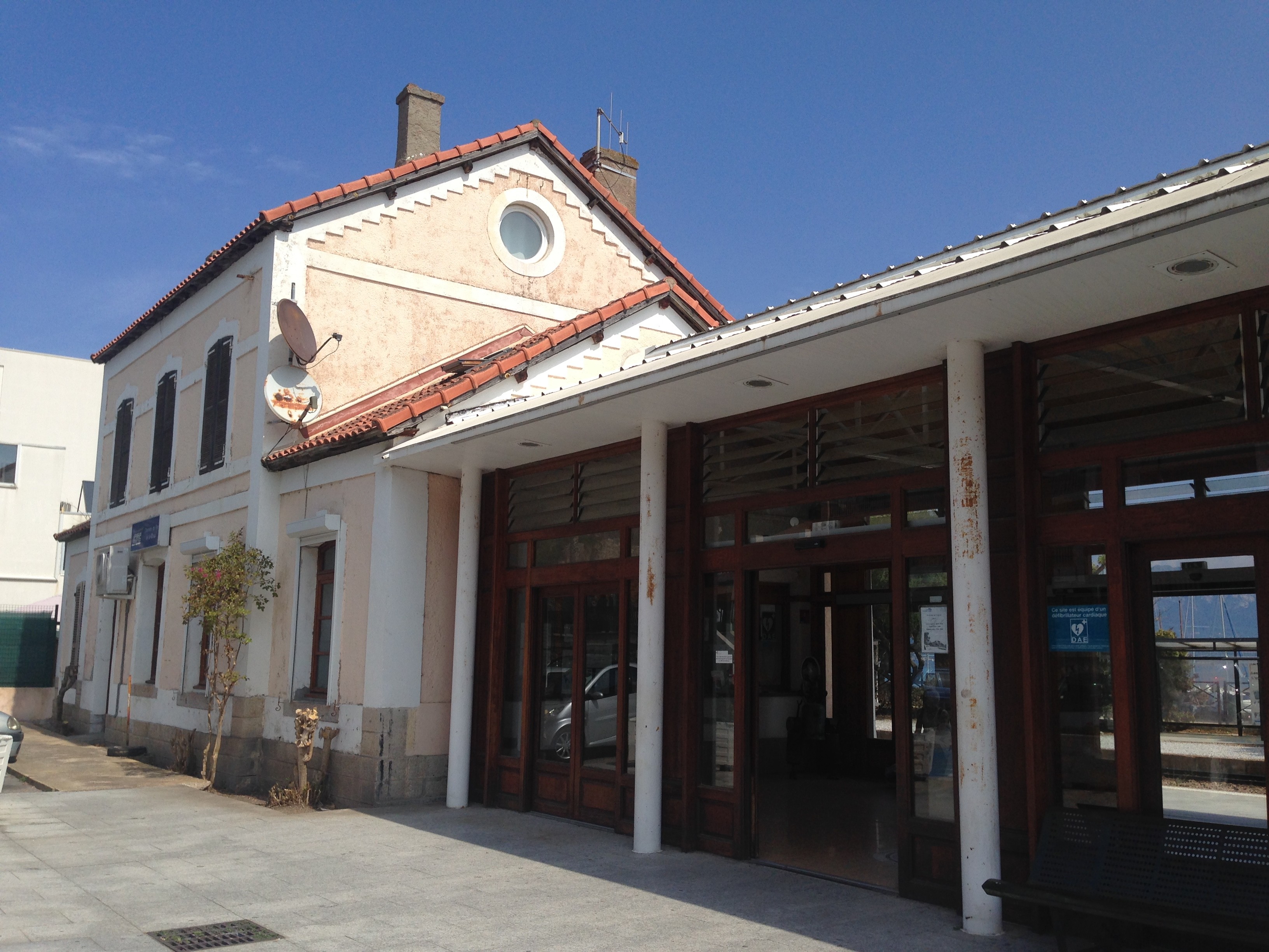 Gare de Calvi-2016